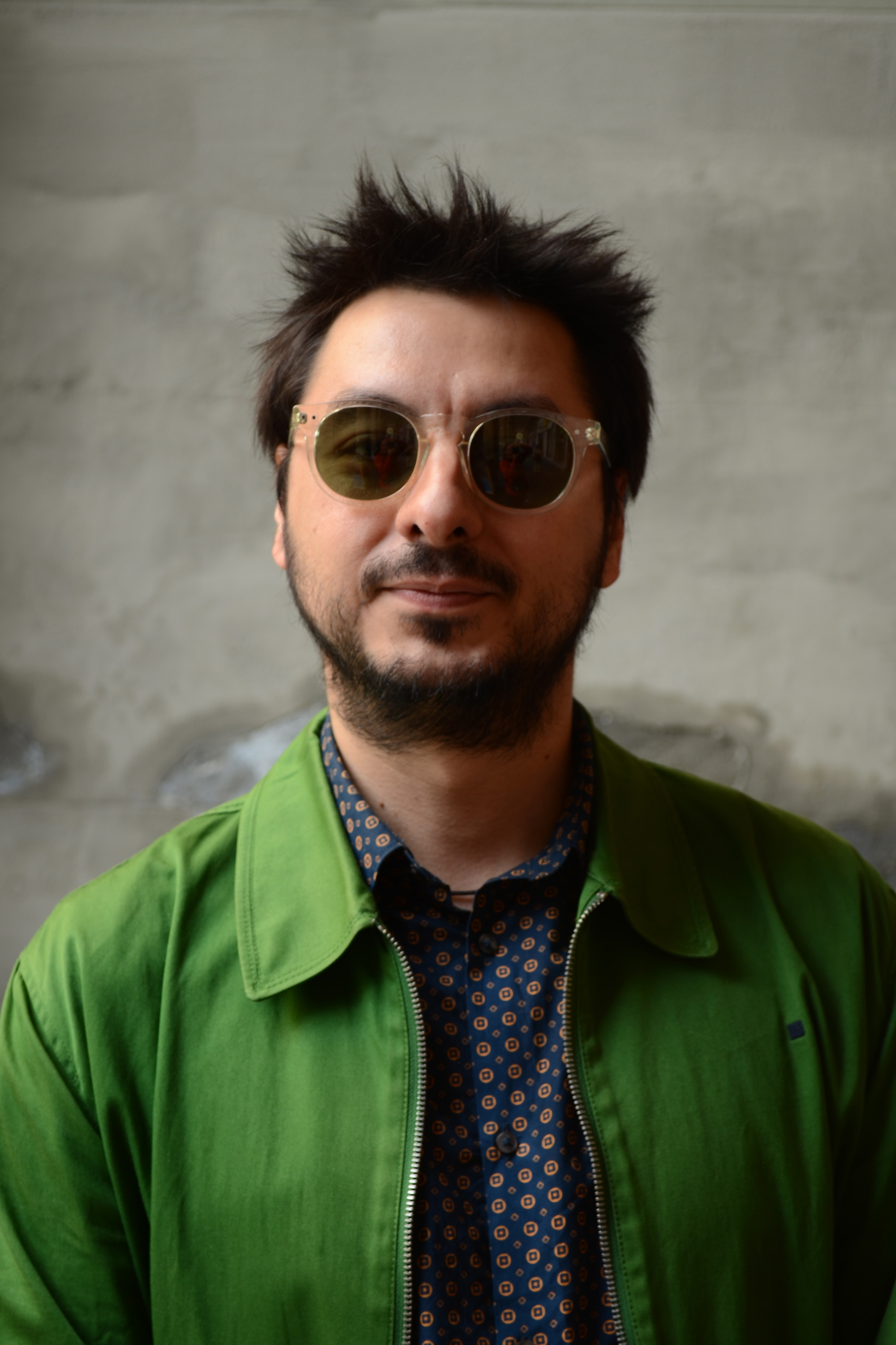 Antonio Lucas, poeta y periodista español